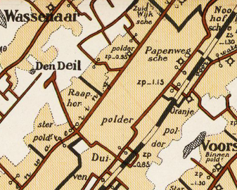 Papenwegsche Polder